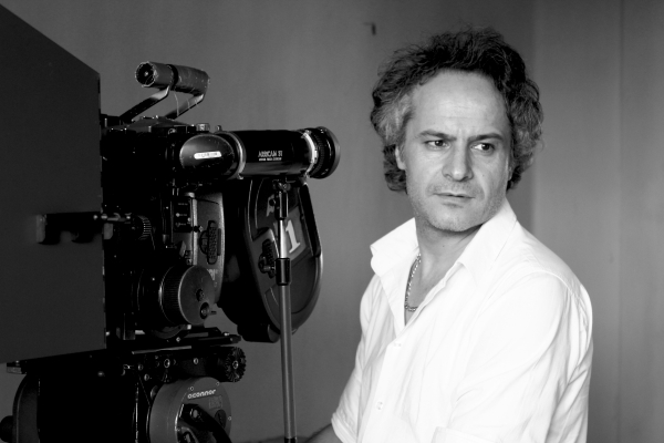 پرویز شهبازی